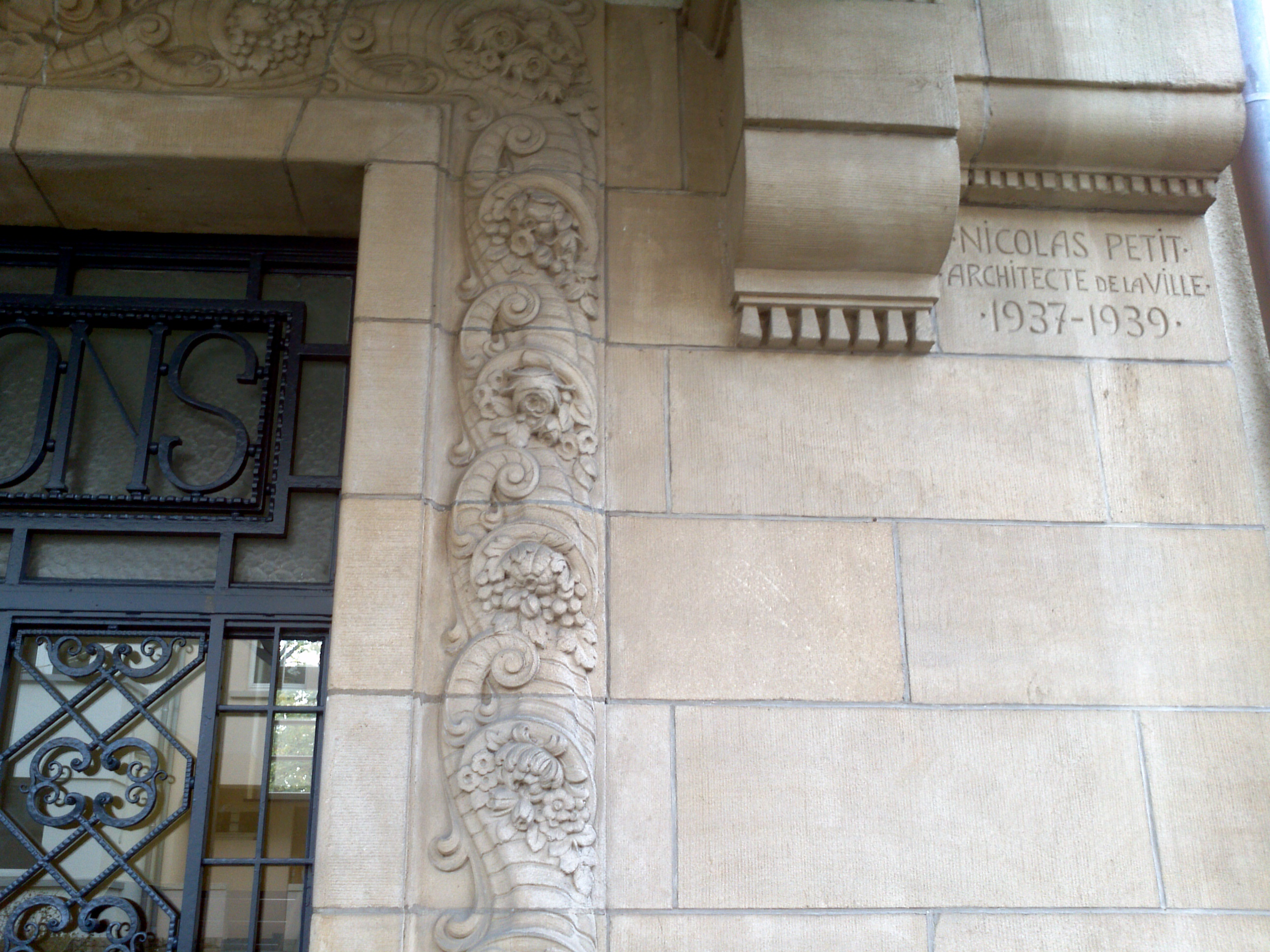 Grundschule Rue Antoine Meyer, Luxemburg-Hollerich